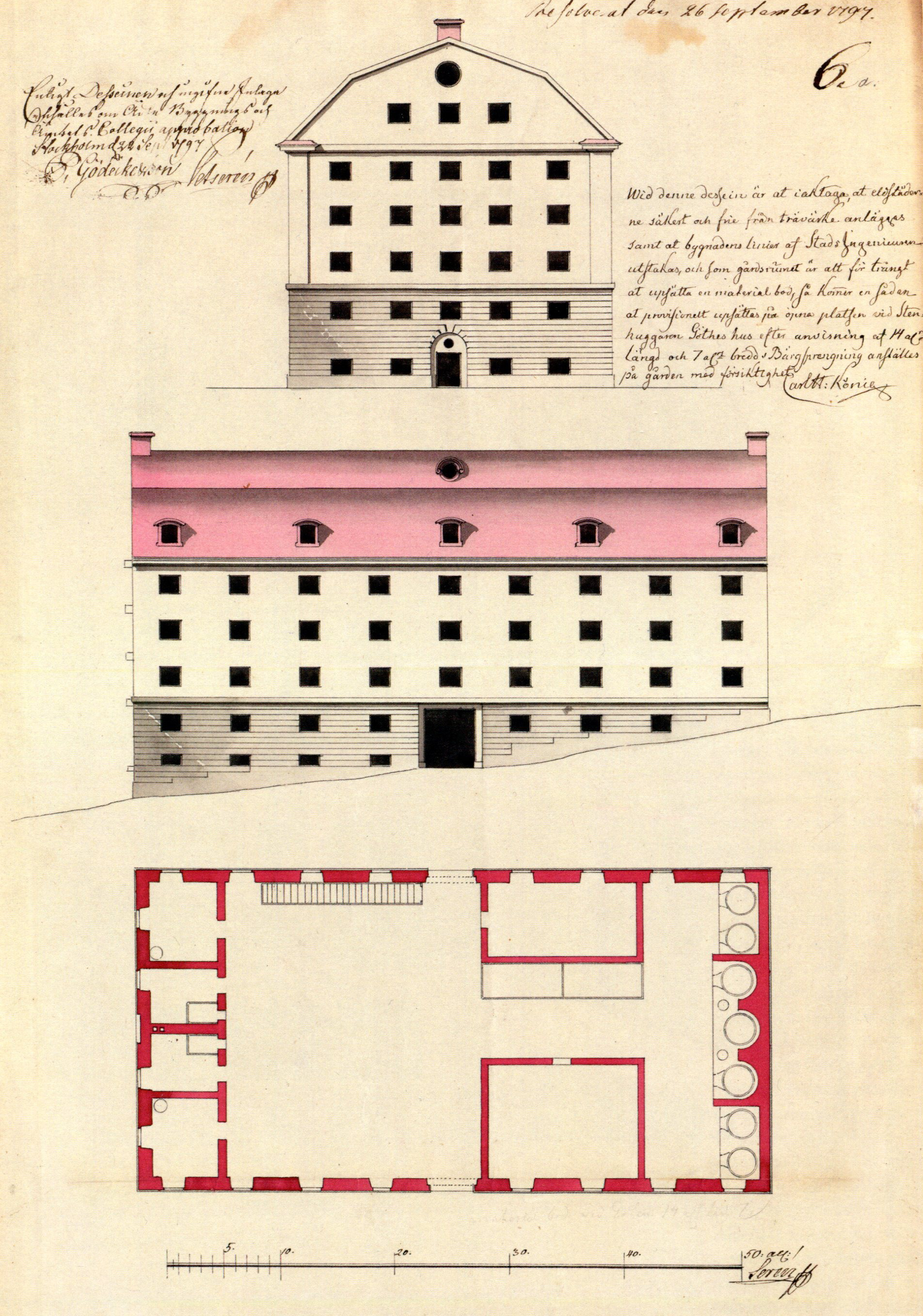 Petter Gödeckes sockerbruk, i kvarteret Svalgången, Södermalm, ritning av Petrus Serén